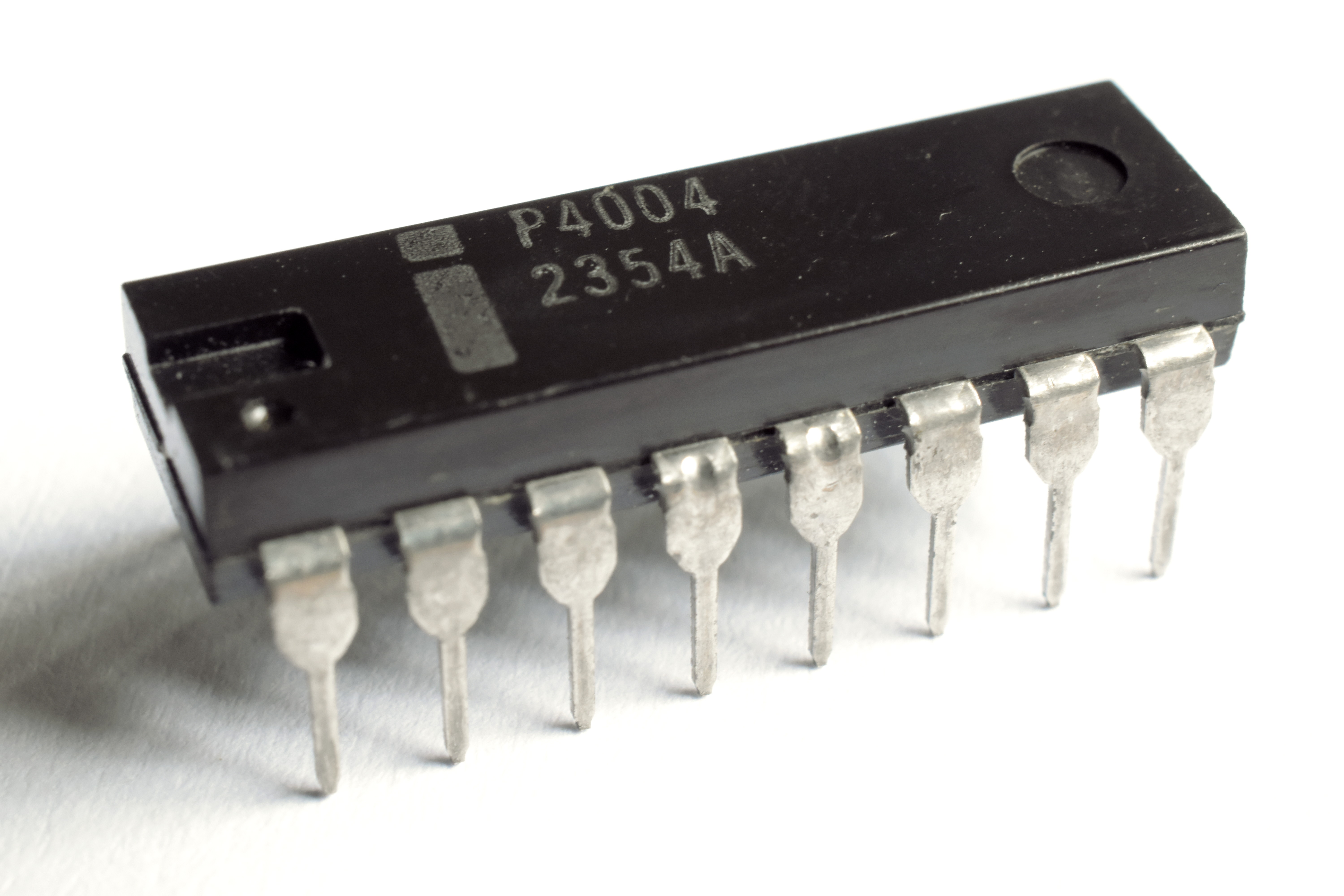 Procesoro Intel P4004.